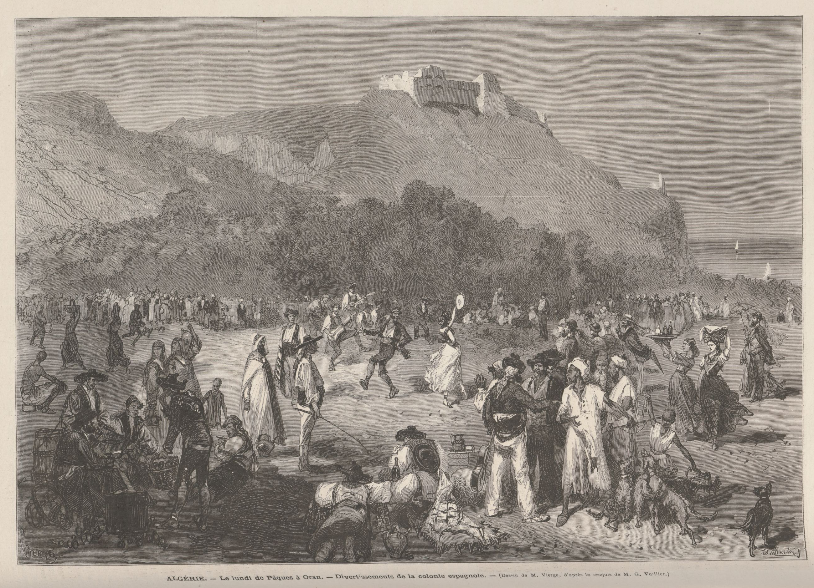 Algérie, le lundi de Pâques à Oran, divertissements de la colonie espagnole (dessin de M. Vierge, d'après le croquis de M. G. Vuillier)